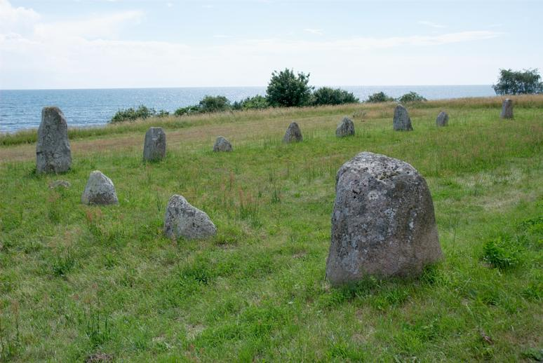 Balkåkra 7:1, är en rektangulär stenkrets, 36 meter lång och 16 meter bred. Motiv: Balkåkra 7:1 Kategori: Stenkrets/domarring/skeppssättning Balkåkra 7:1, är en rektangulär stenkrets, 36 meter lång och 16 meter bred. Balkåkra 7:1.